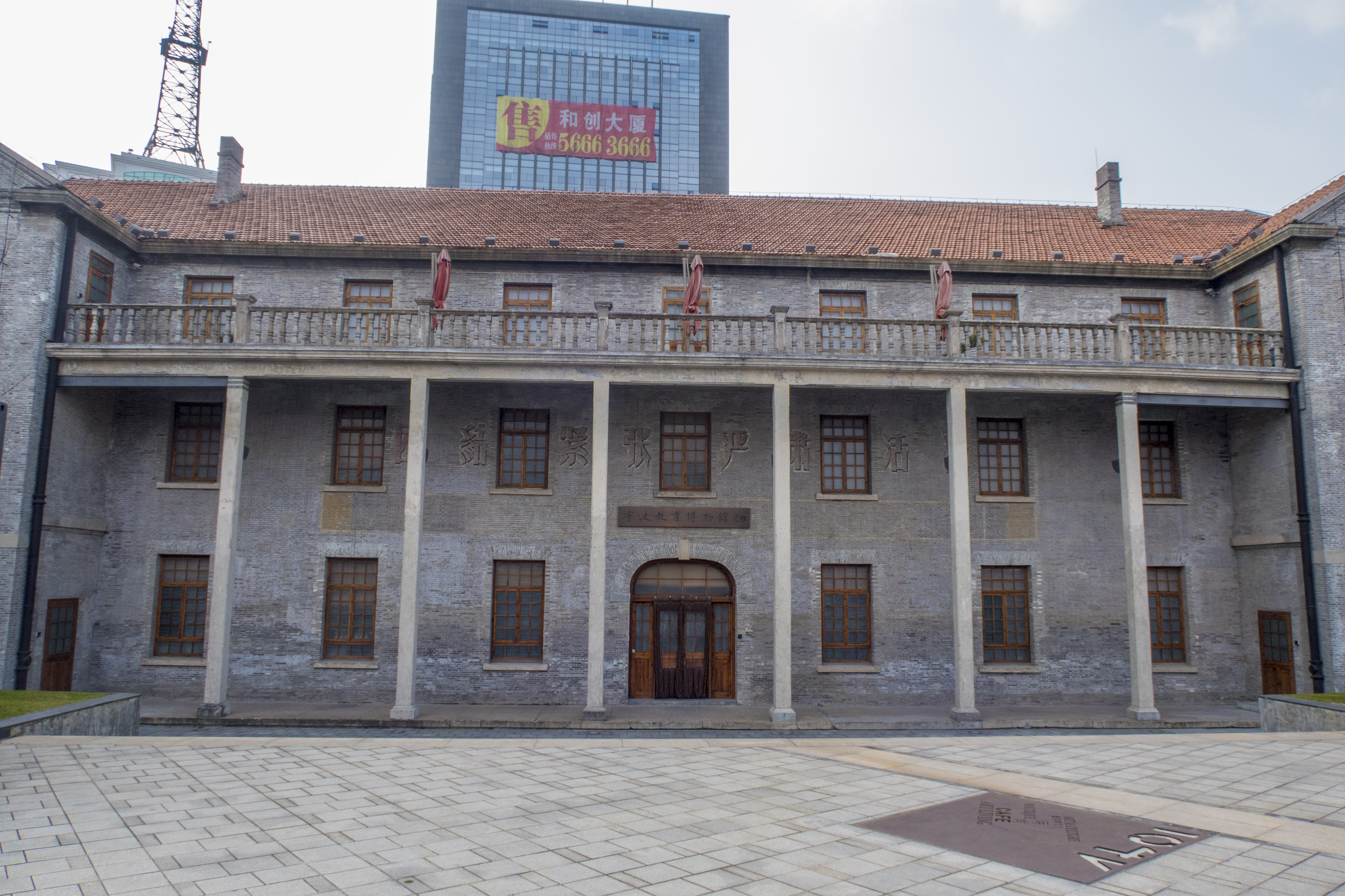 宁波教育博物馆（甬江女中旧址）